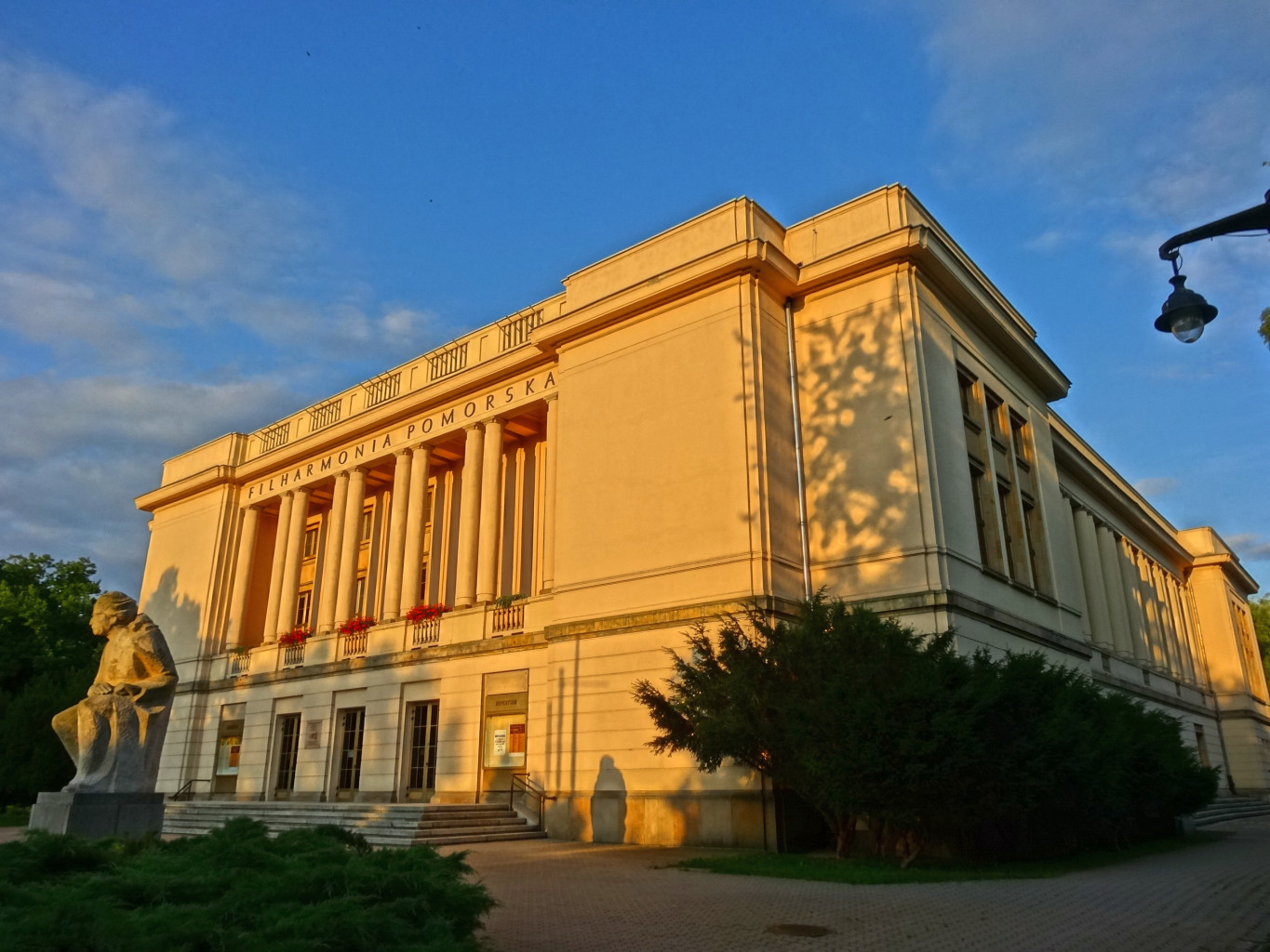 Budynek Filharmonii Pomorskiej im.Ignacego Jana Paderewskiego w Bydgoszczy zbud.w 1955 r.